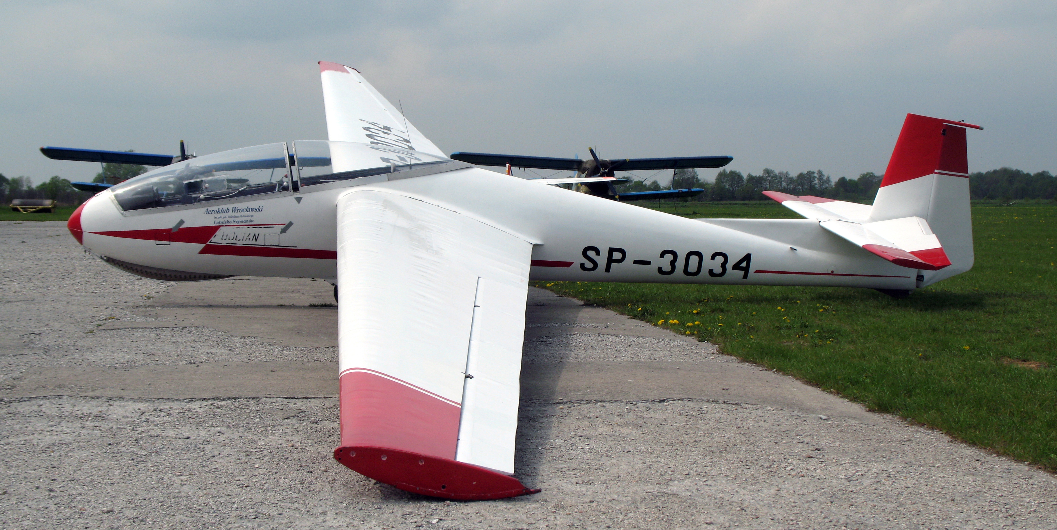 Szybowiec SZD-9 Bocian SP 3034 - aeroklub wrocławski